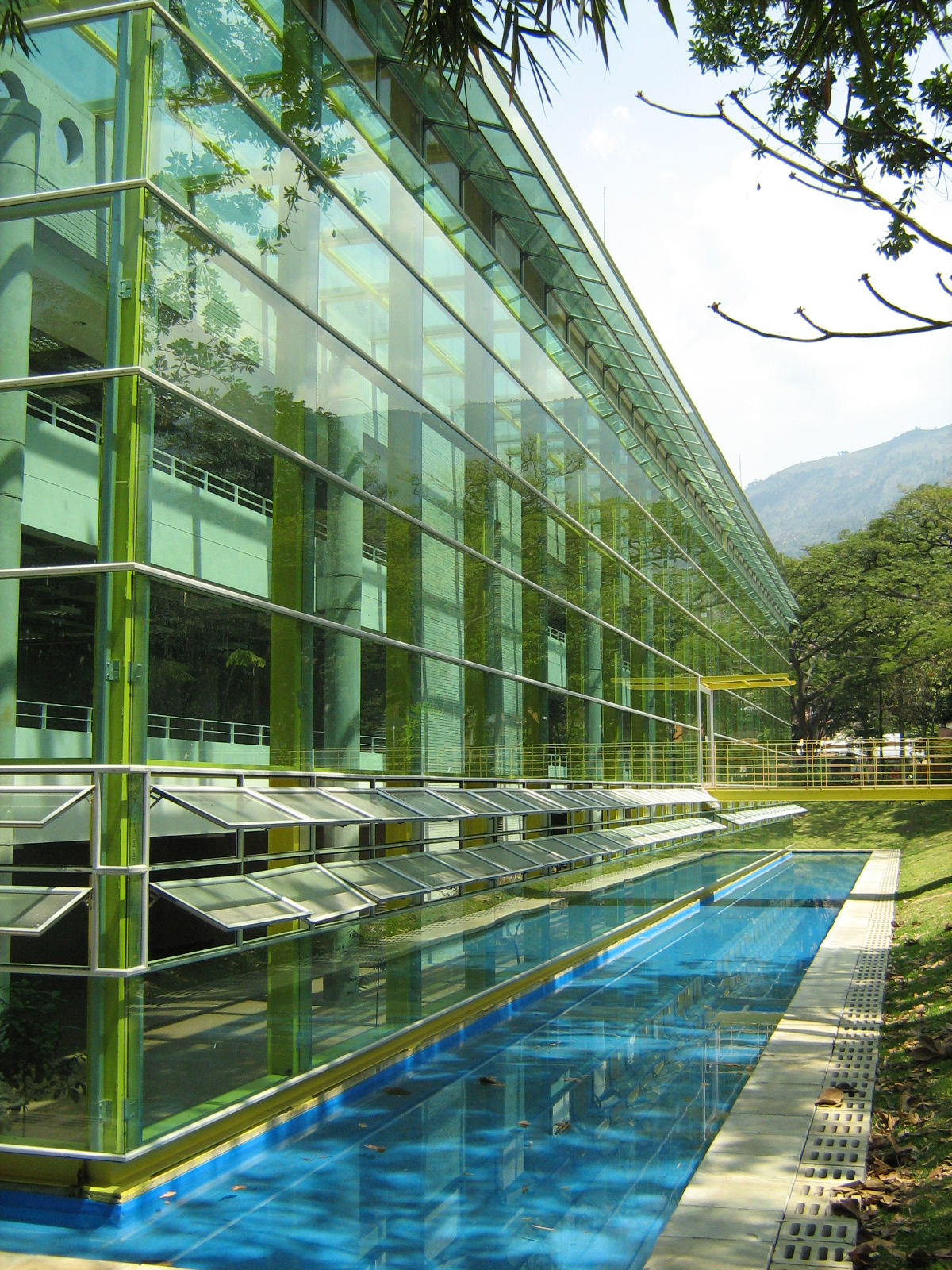 Jardín Botánico de Medellín, Edificio Científico, Medellín, Colombia